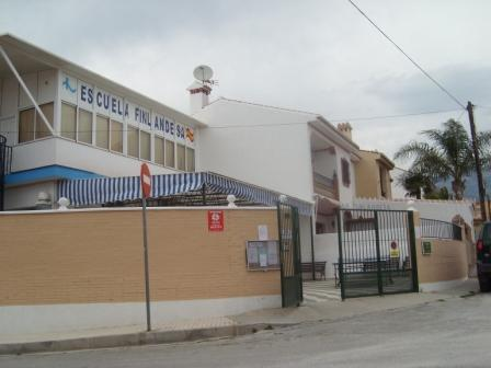 Finska skolan fuengirola 2007